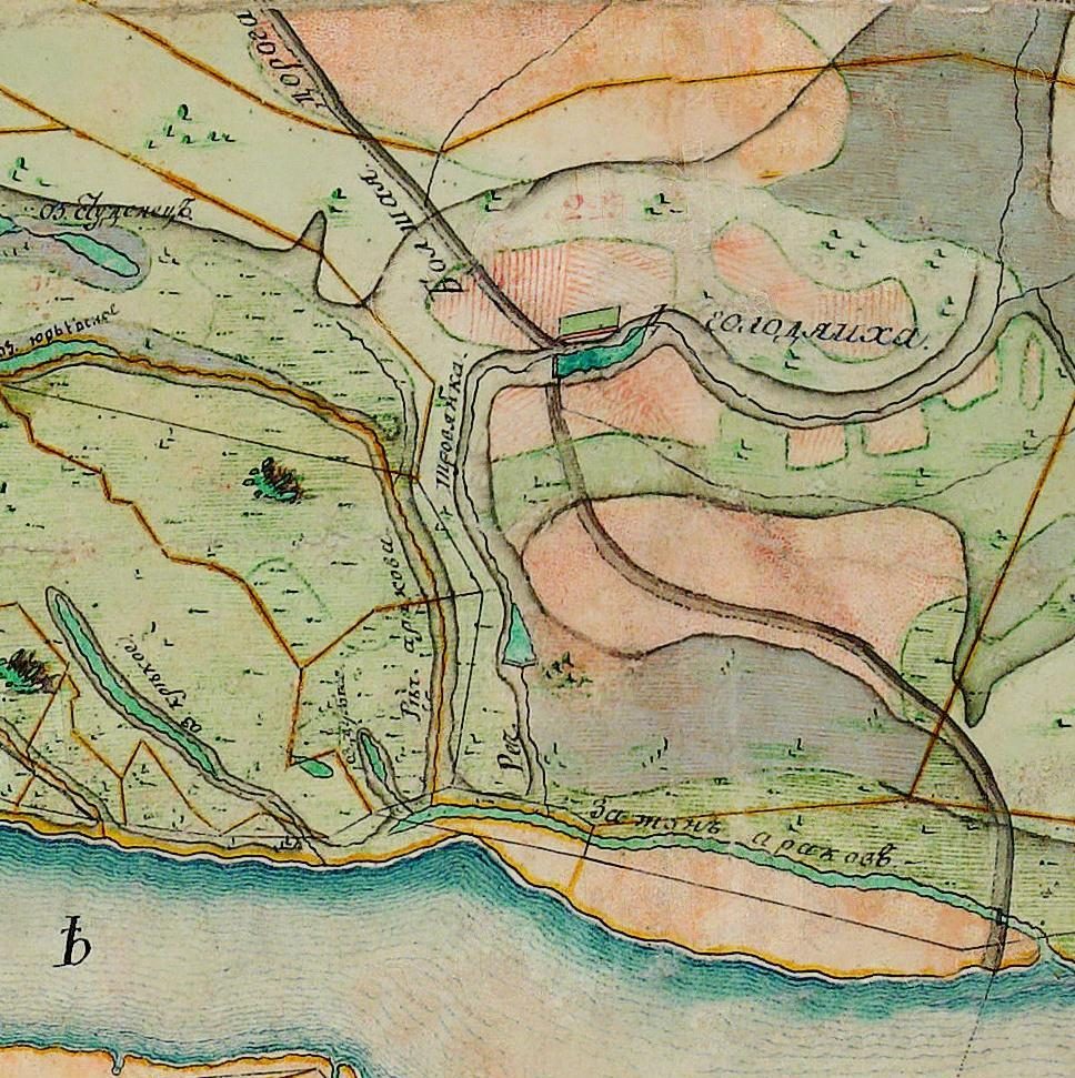 Фрагмент "Генерального геометрического плана города Чебоксар и его уезда, состоящий в Казанской губернии", 1793